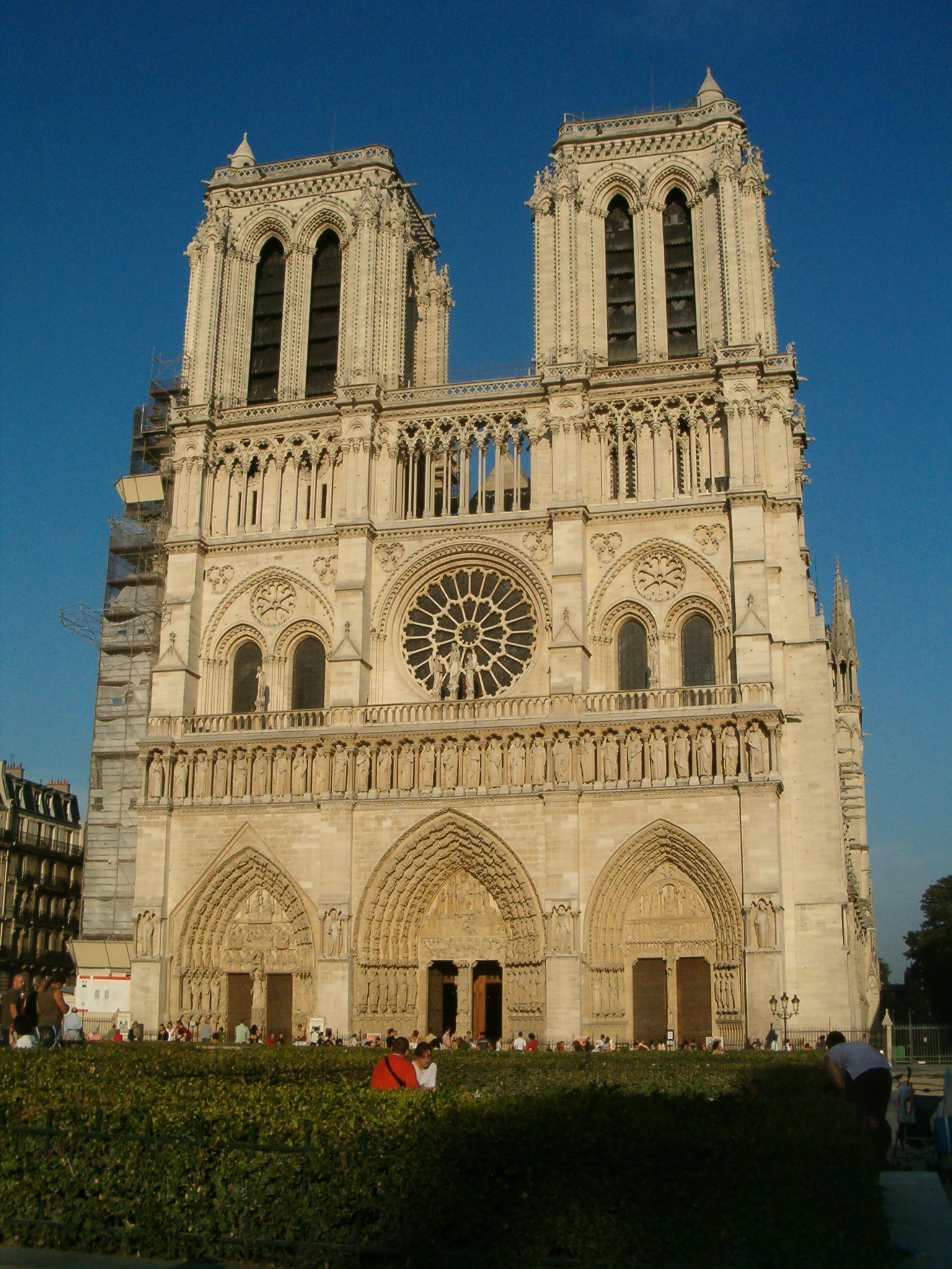 Notre Dame Batı Cephesi Kaynak: Tembelejderha